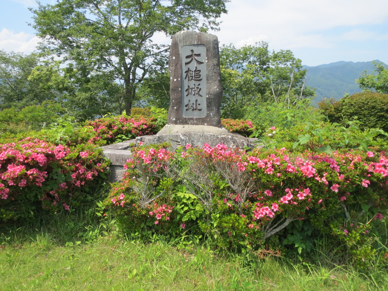 かつて岩手県大槌町の存在した城跡を表す石碑。大槌城跡公園内にある。